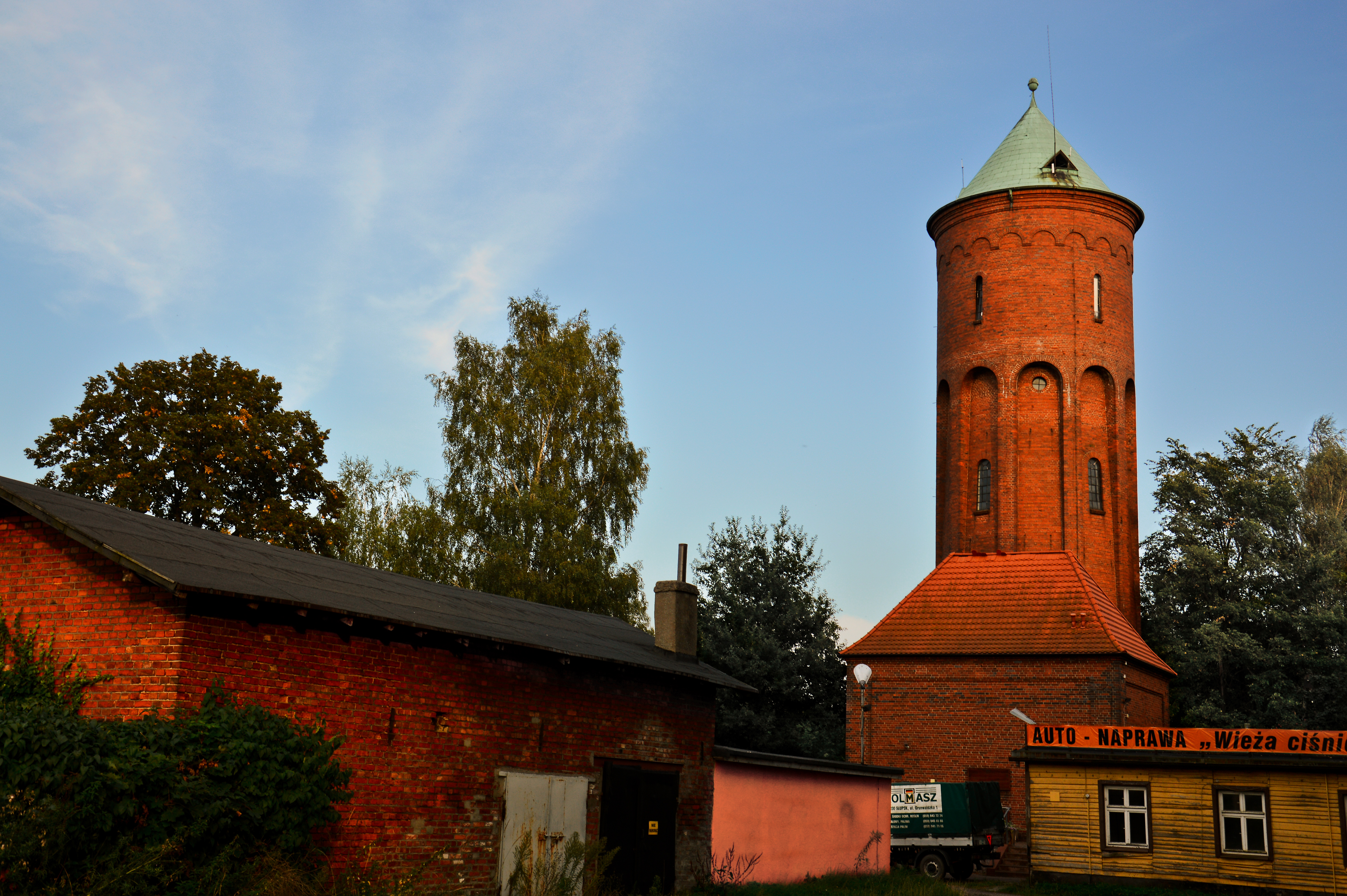 Sławno, zespół wodociągowej wieży ciśnień, 1927